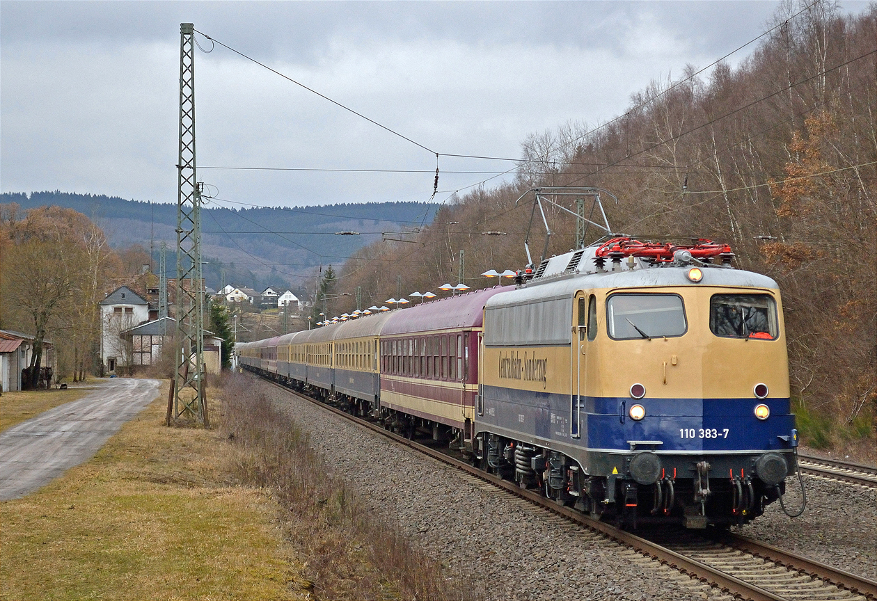 110 383-7 der Centralbahn AG mit dem "Krokus-Express" DPF 13493 auf der Dillstrecke bei Dillbrecht (Februar 2017).